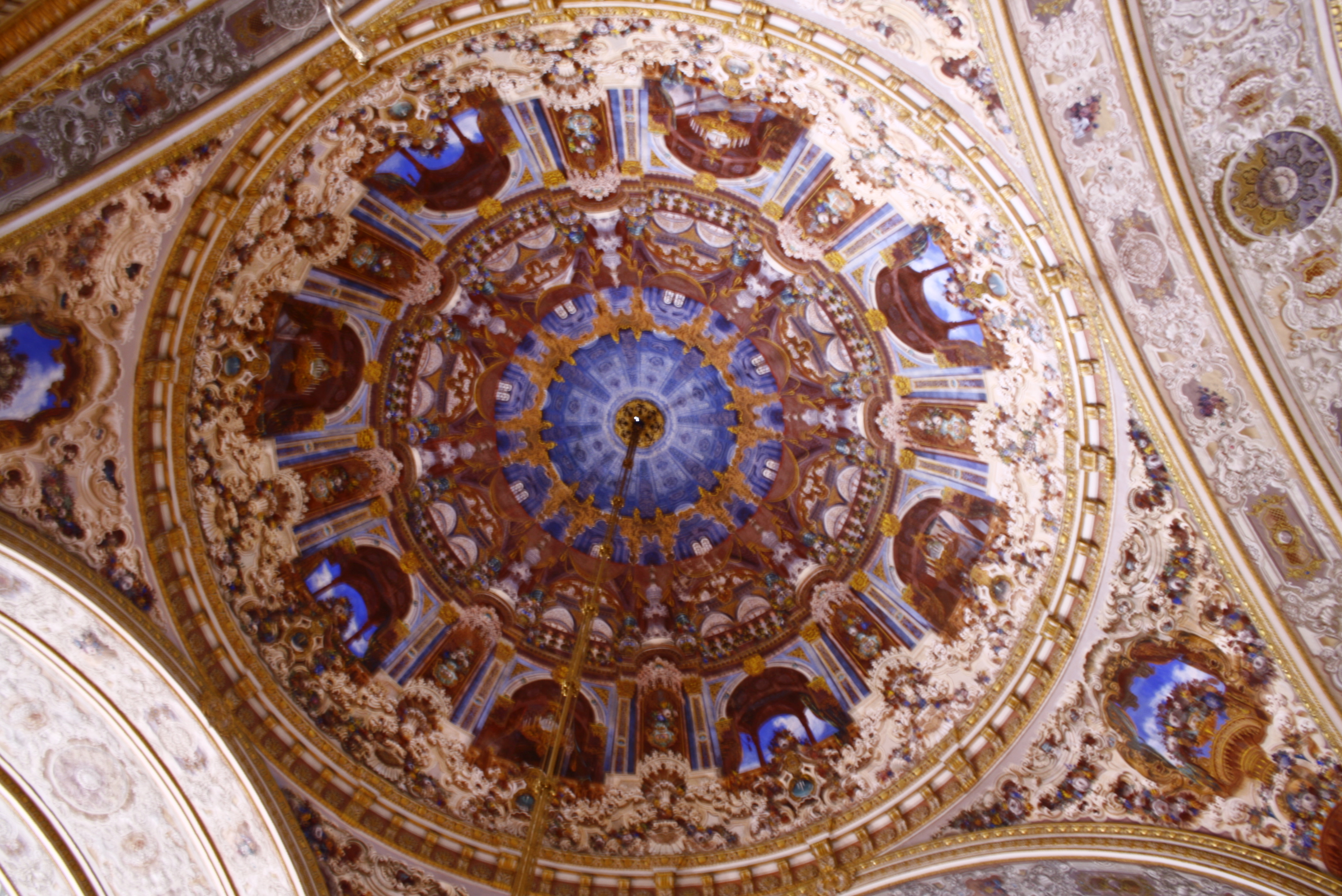 Die Kuppel des Festsaales